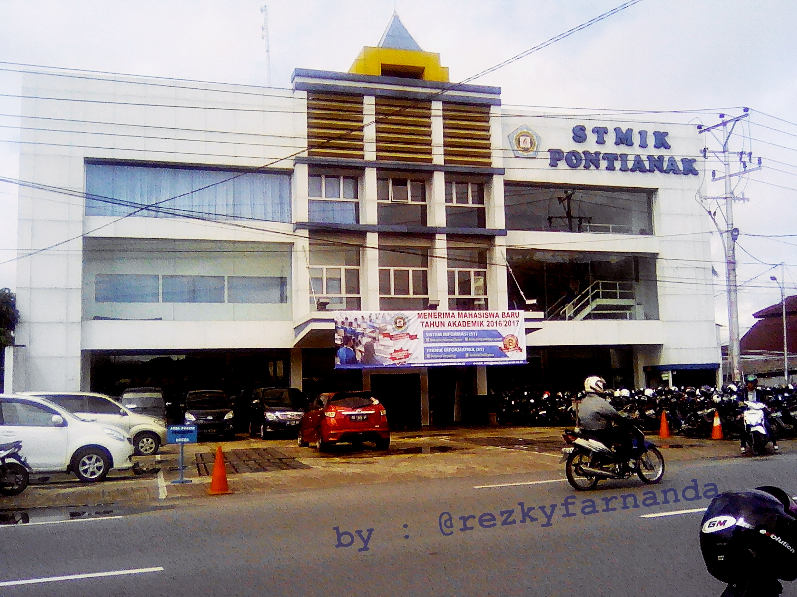 Gedung STMIK Pontianak yang terletak di Jalan Merdeka no. 372 Pontianak